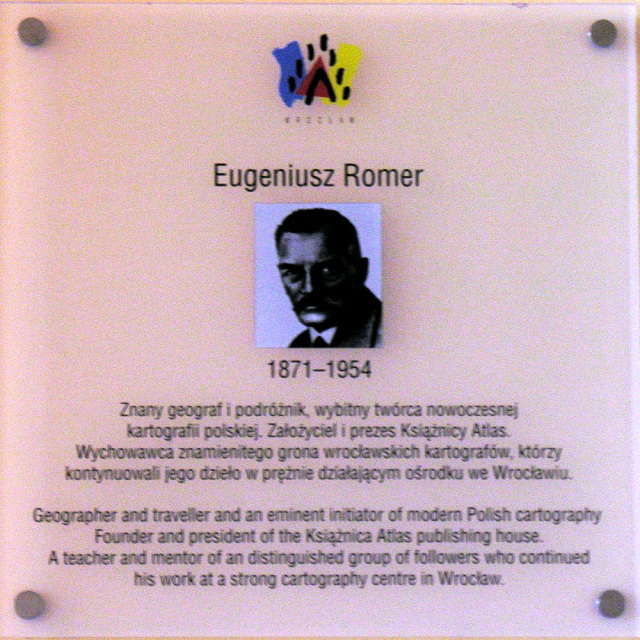 Tablica ku czci Eugeniusza Romera w przejściu pod głównym budynkiem Uniwersytetu Wrocławskiego